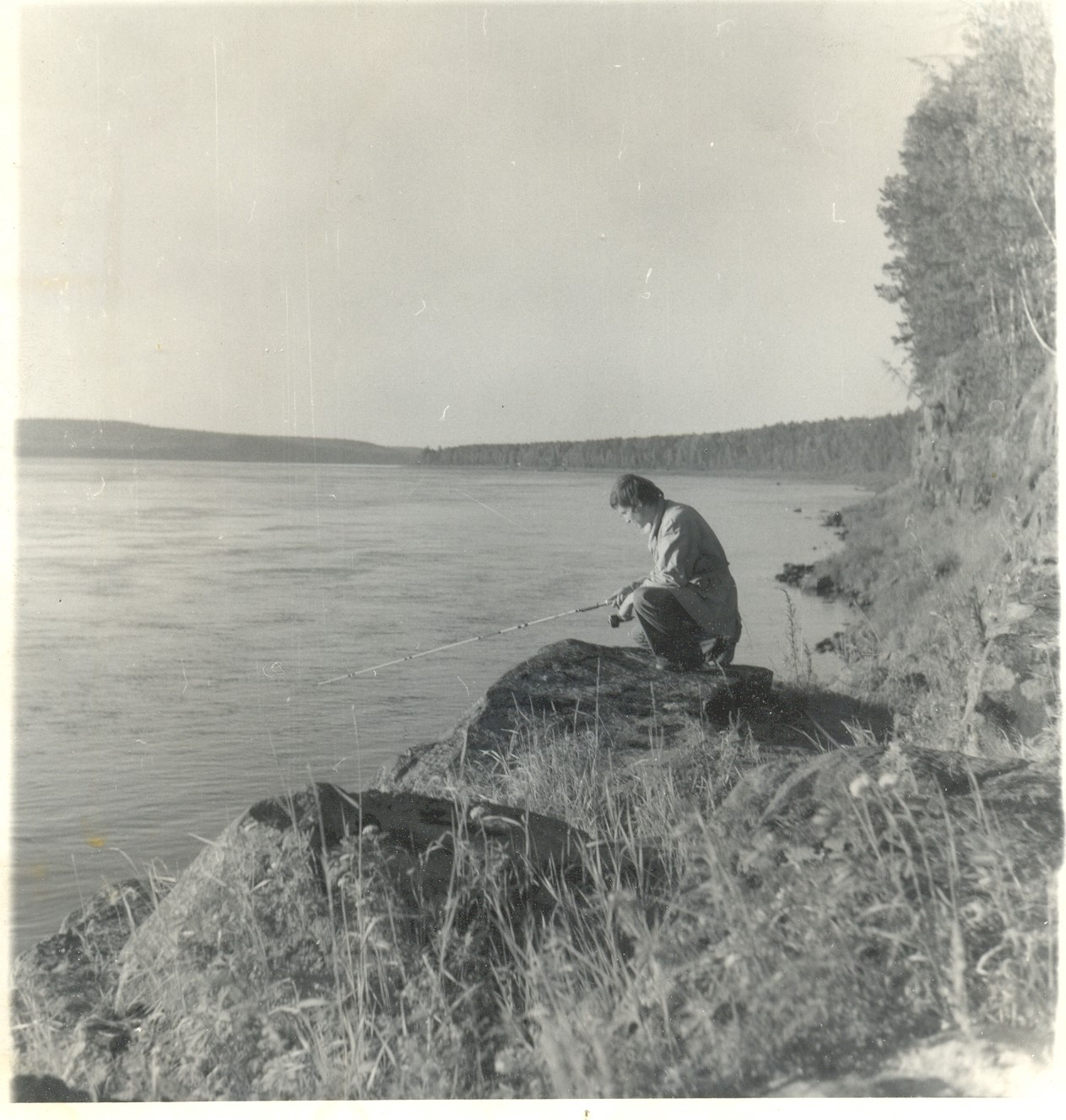 Angara v původní kráse.